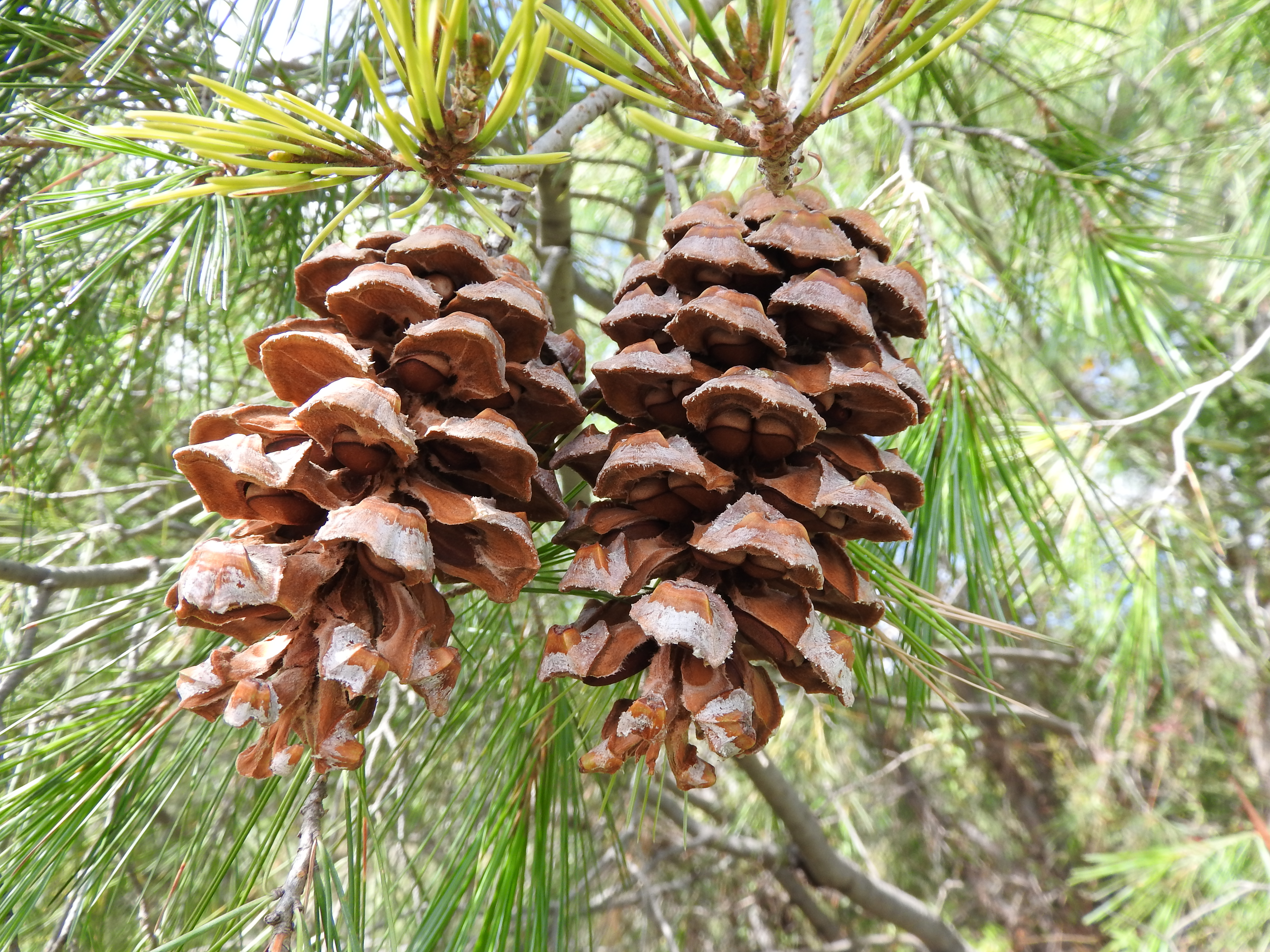 Pinus pinceana, Saltillo, Coahuila, México